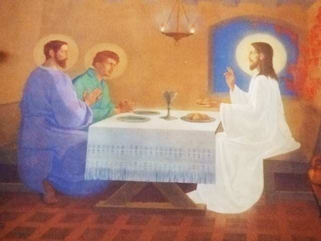 Pfarrkirche St. Martin, Kirchberg an der Iller, Landkreis Biberach Emmausszene